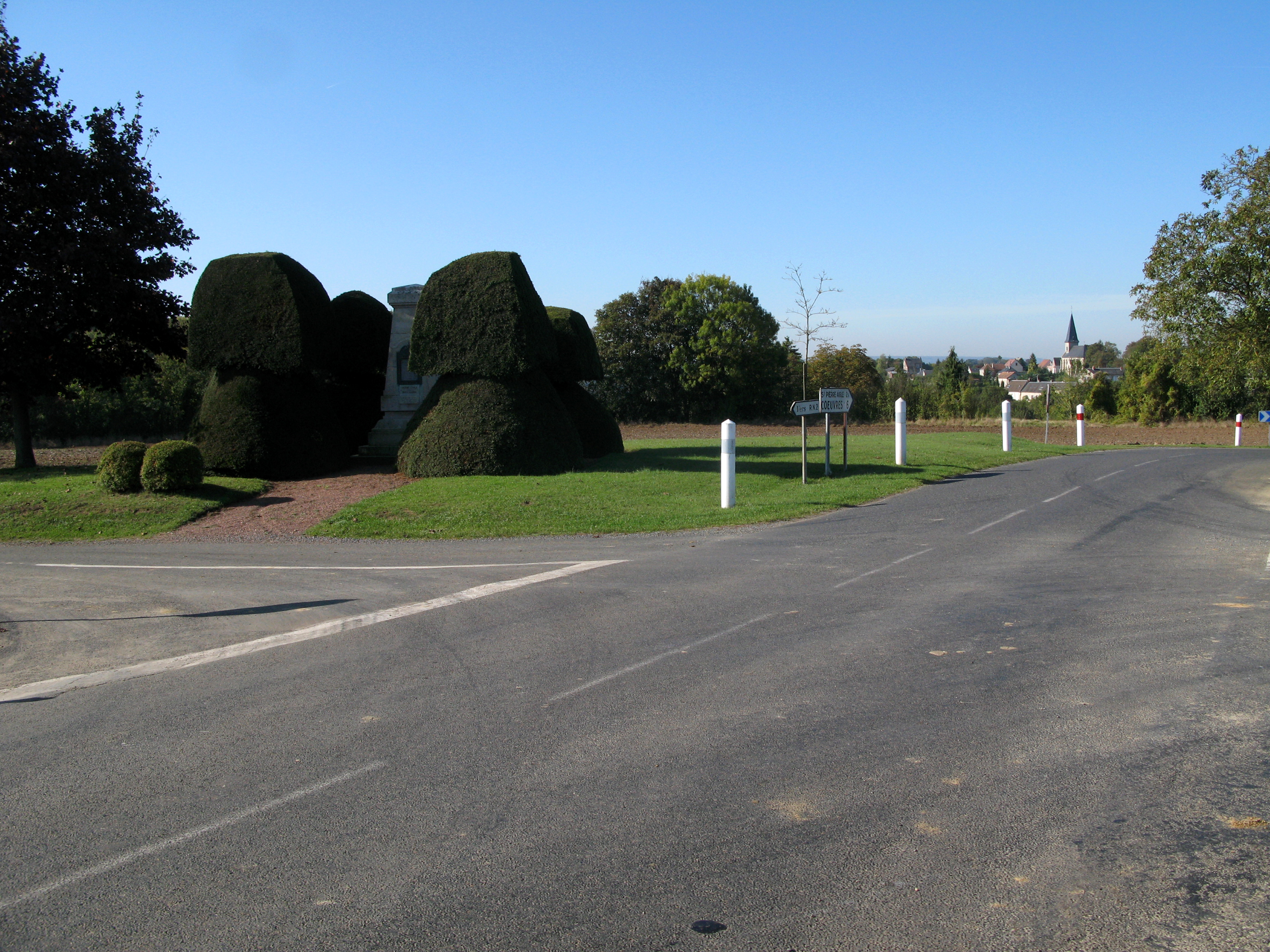 Dommiers (Aisne, France) - Le monument-aux-morts avec panorama sur le village. Photo prise au carrefour, à l'Est du village, où un chemin à droite mène à la ferme de La Glaue. . .